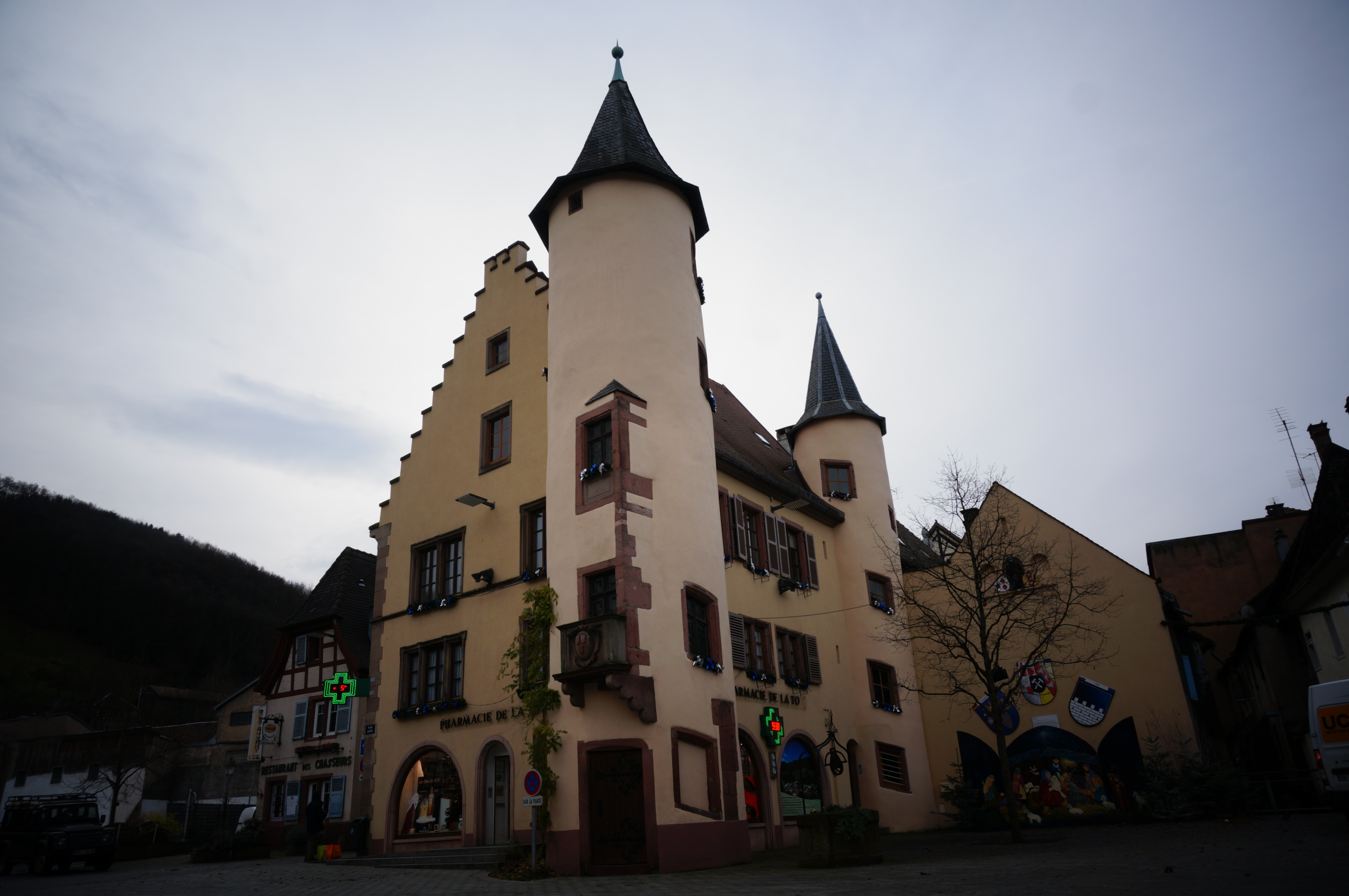 lors de la formation photo de Wikimedia France.